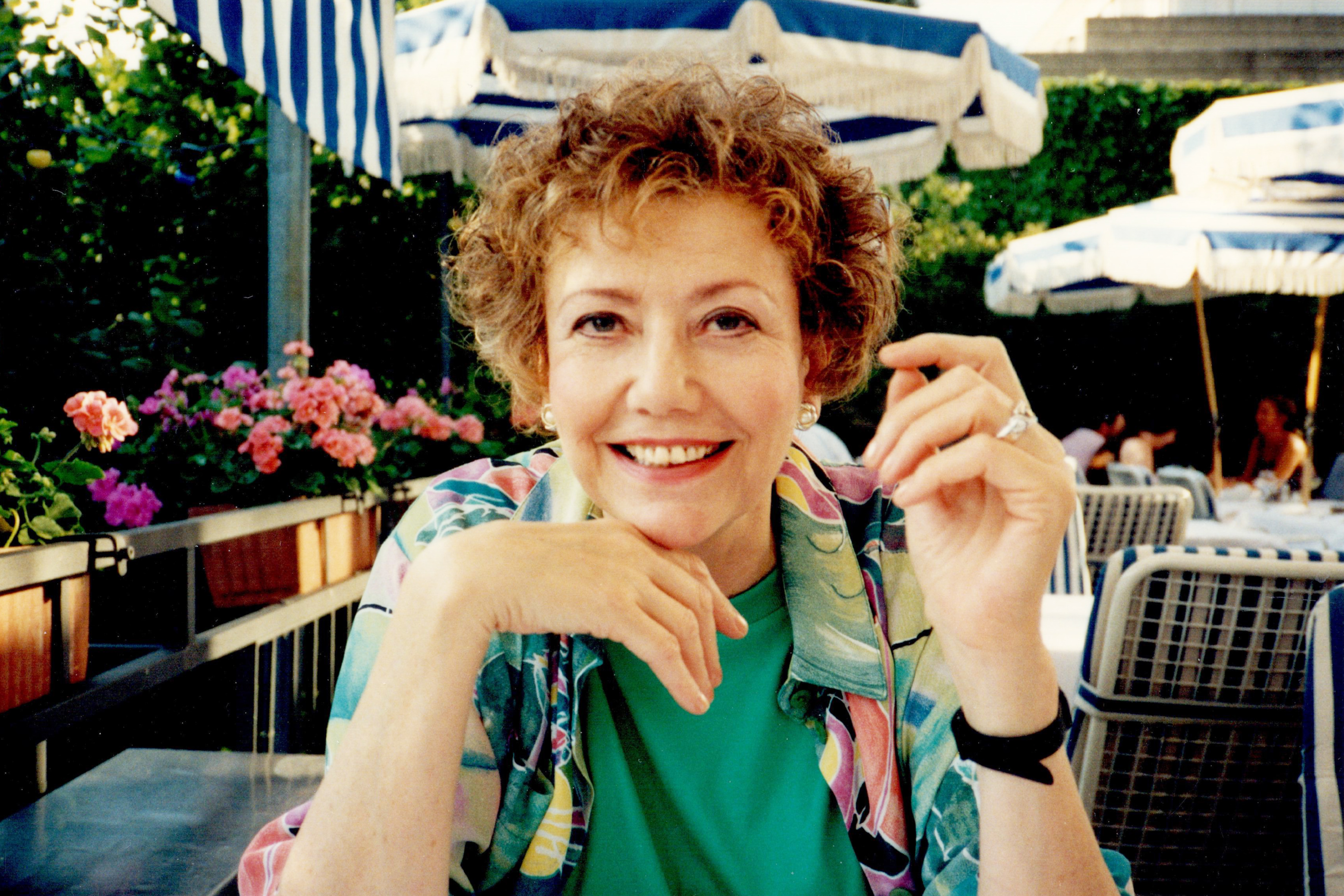 Miriam Spoerri im Waldhaus Dolder Zürich, Sommer 1991